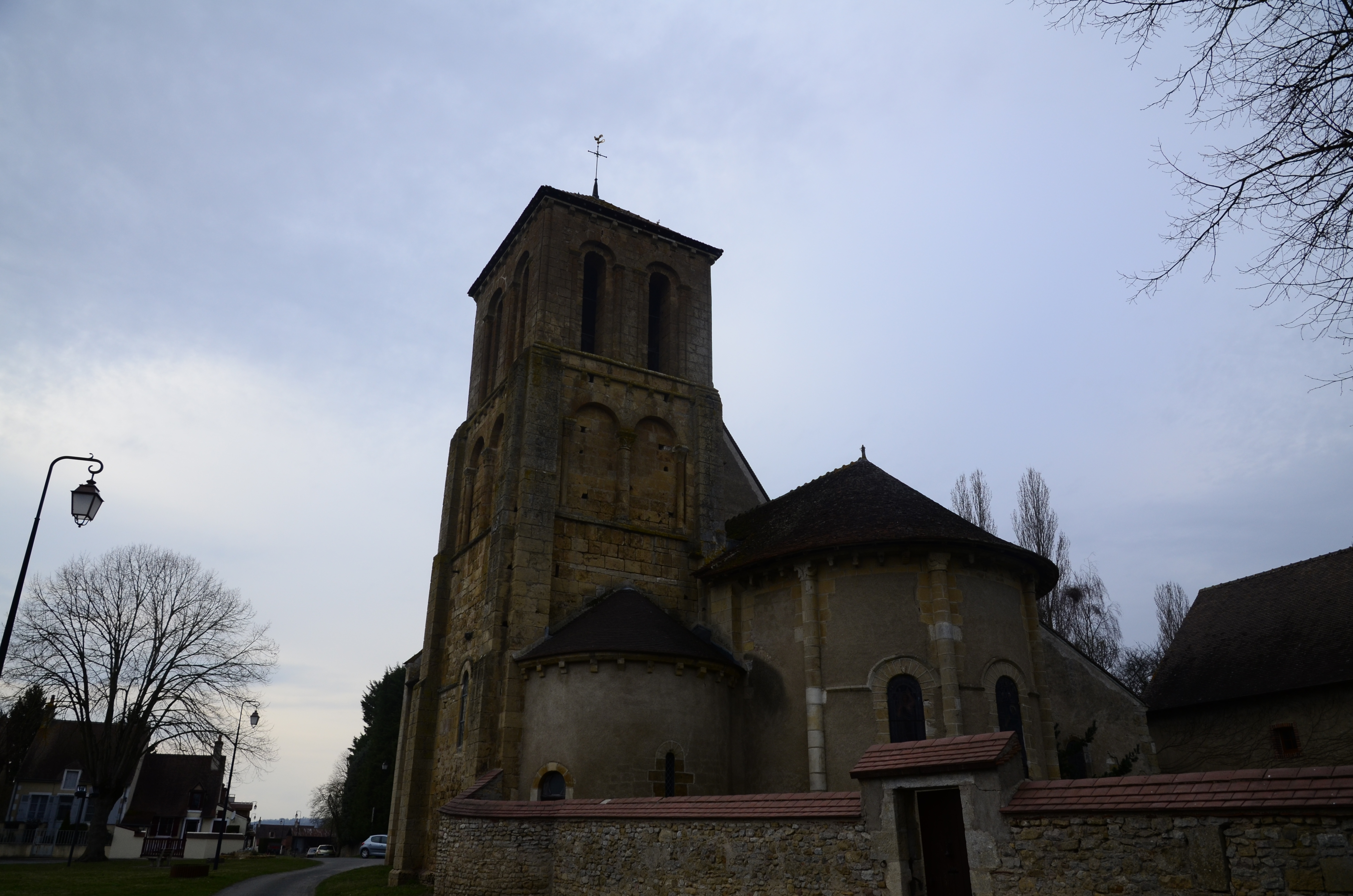 Vue du clocher et des deux absides de l'édifice.